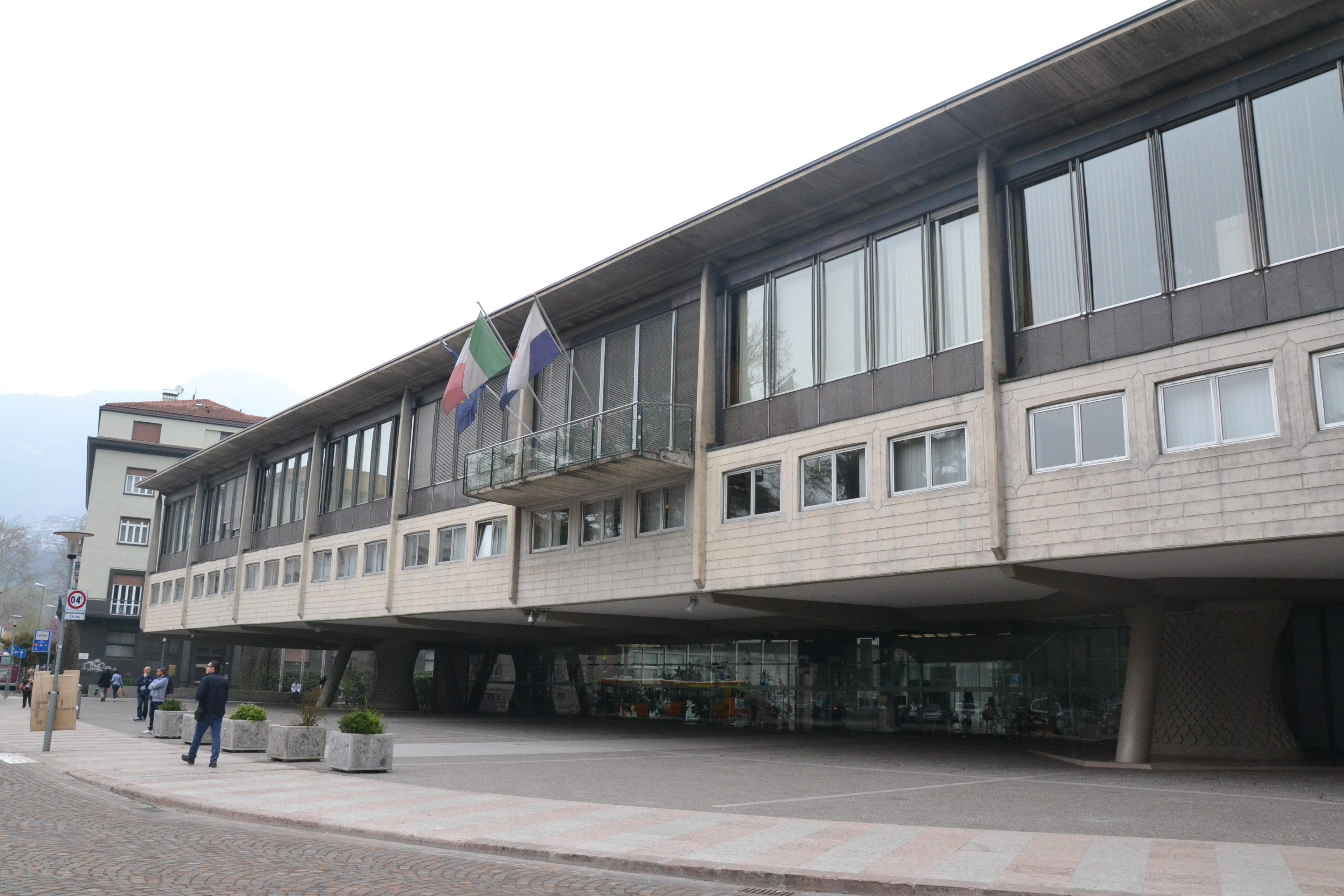 Siège de la région autonome du Trentin-Haut-Adige à Trente (Italie).